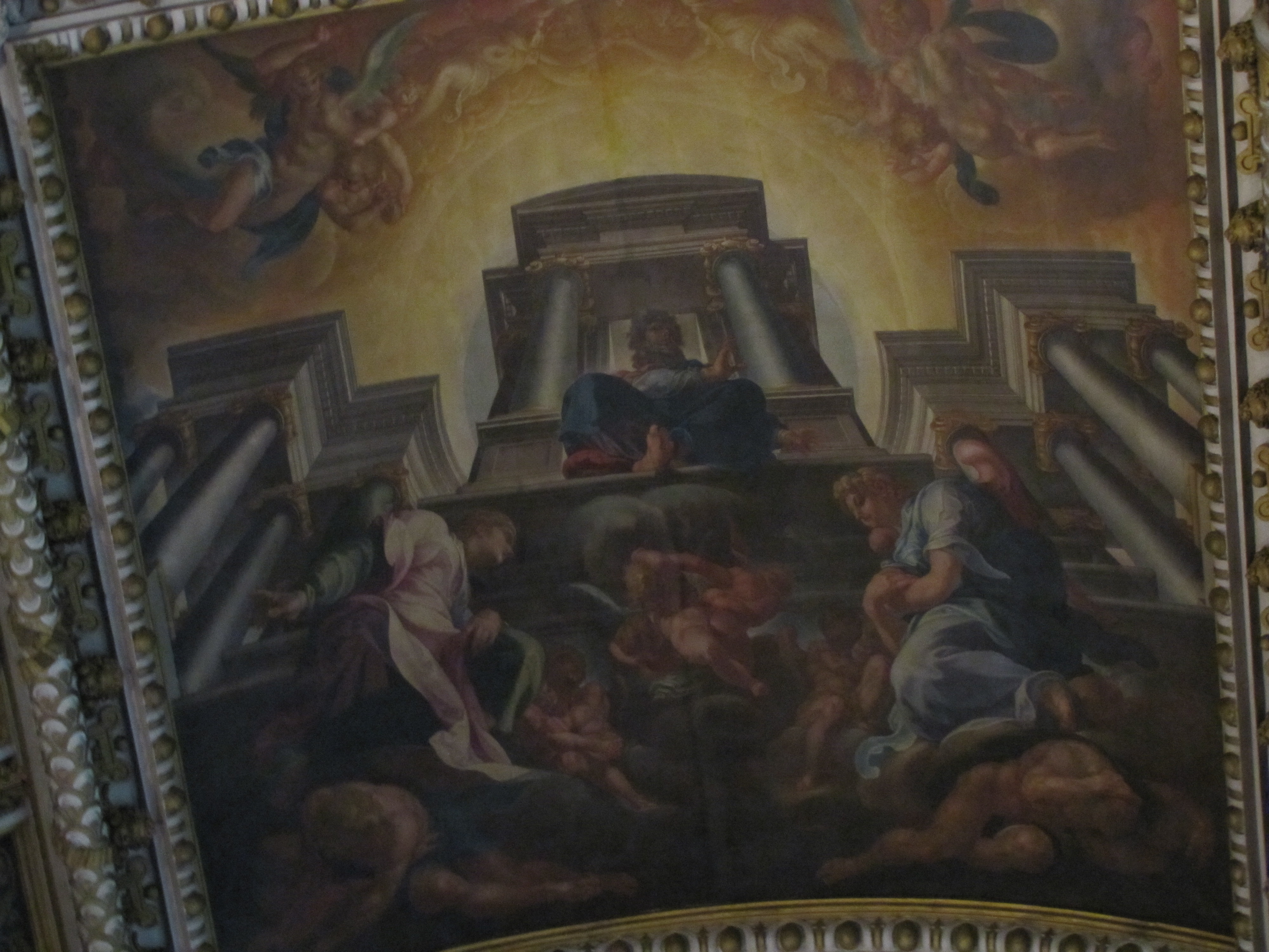 Martin Fréminet, détail du décor de la chapelle de la Trinité au château de Fontainebleau, 1608 - 1619, Fontainebleau, musée national du château